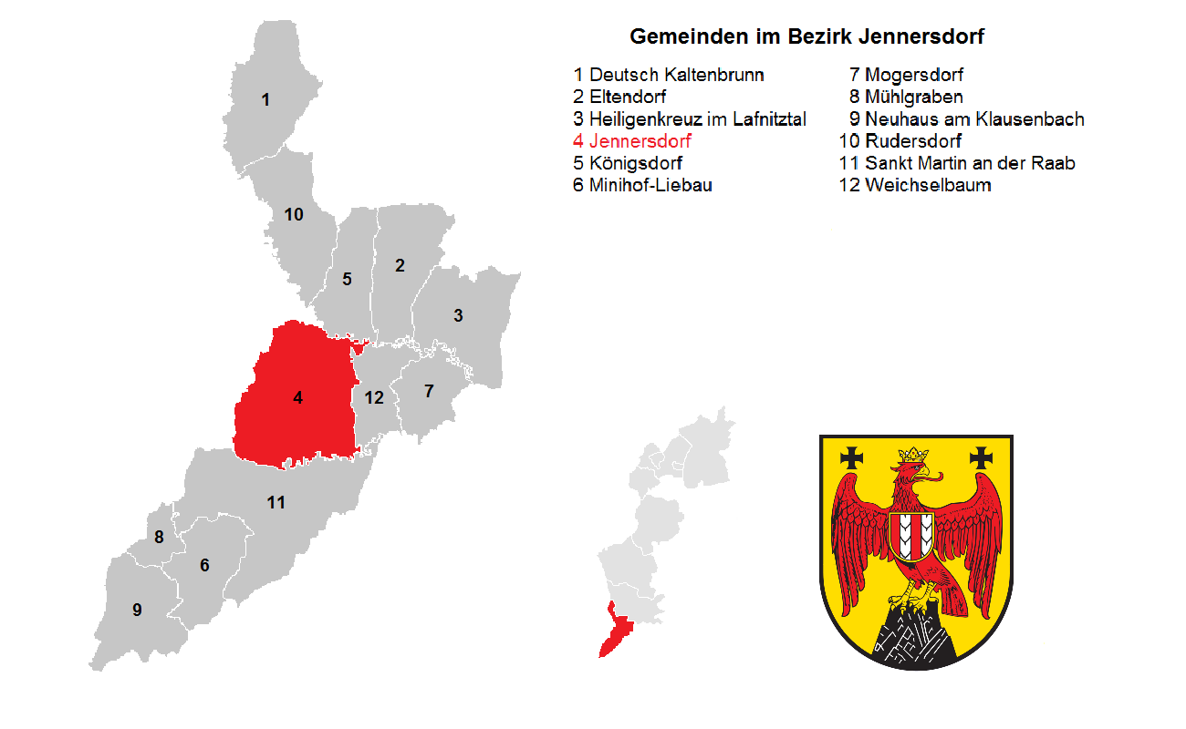 Bezirk Jennersdorf